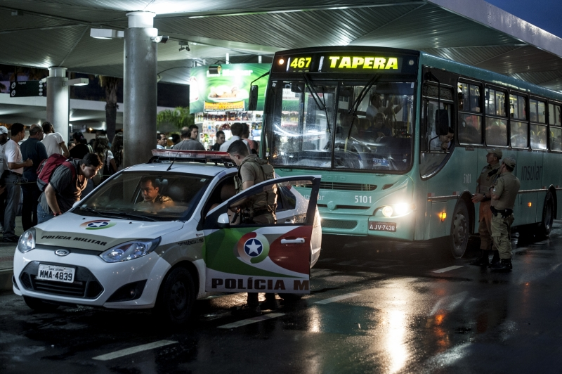 Florianópolis/SC - Ônibus saem do Terminal Central de Florianópolis (Ticen) com escolta policial após onda de violência em várias cidades de Santa Catarina. O esquema especial de segurança funcionará das 20h às 23h